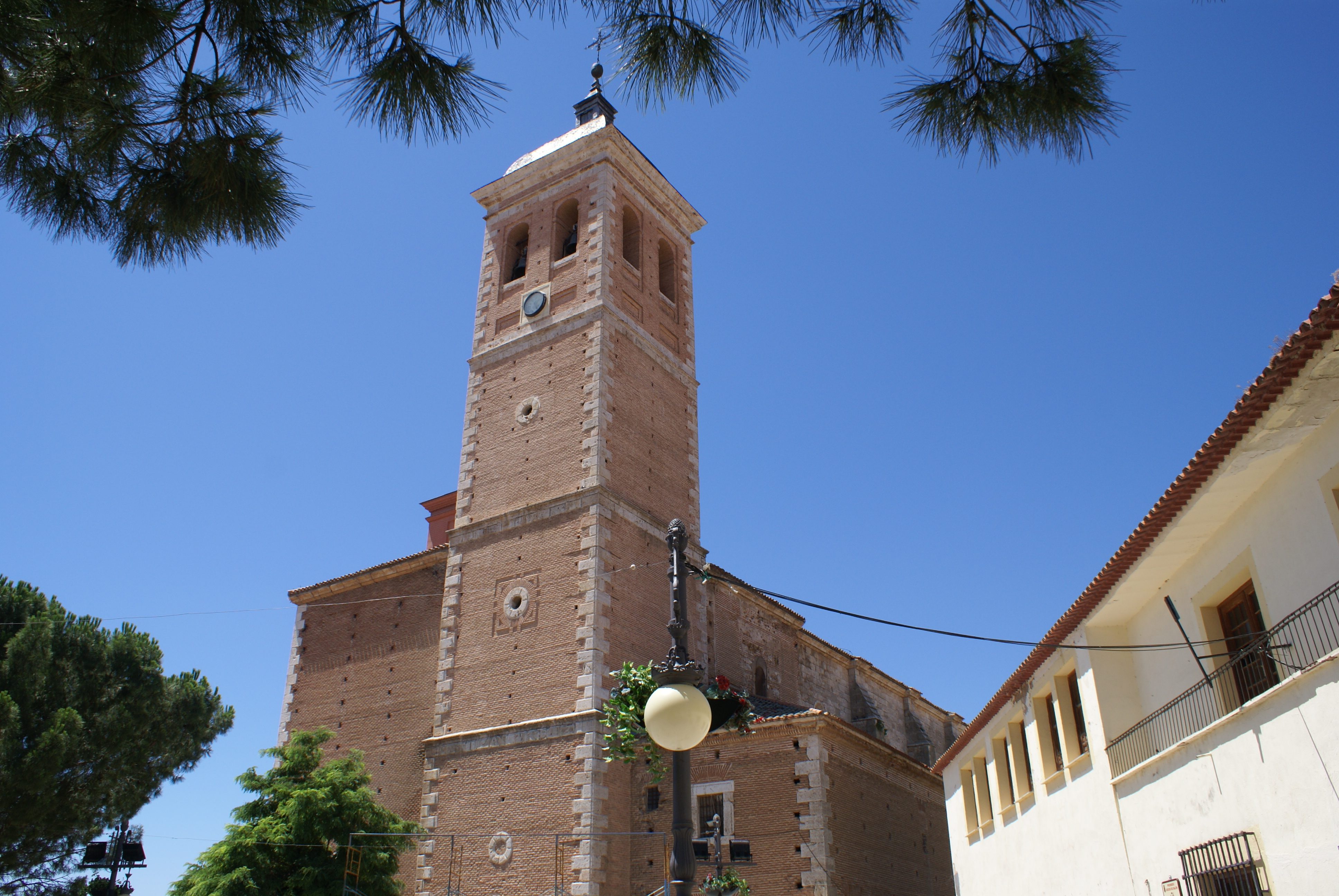 Iglesia de Nuestra Señora de la Asunción de Meco, Comarca de Alcalá, Madrid.